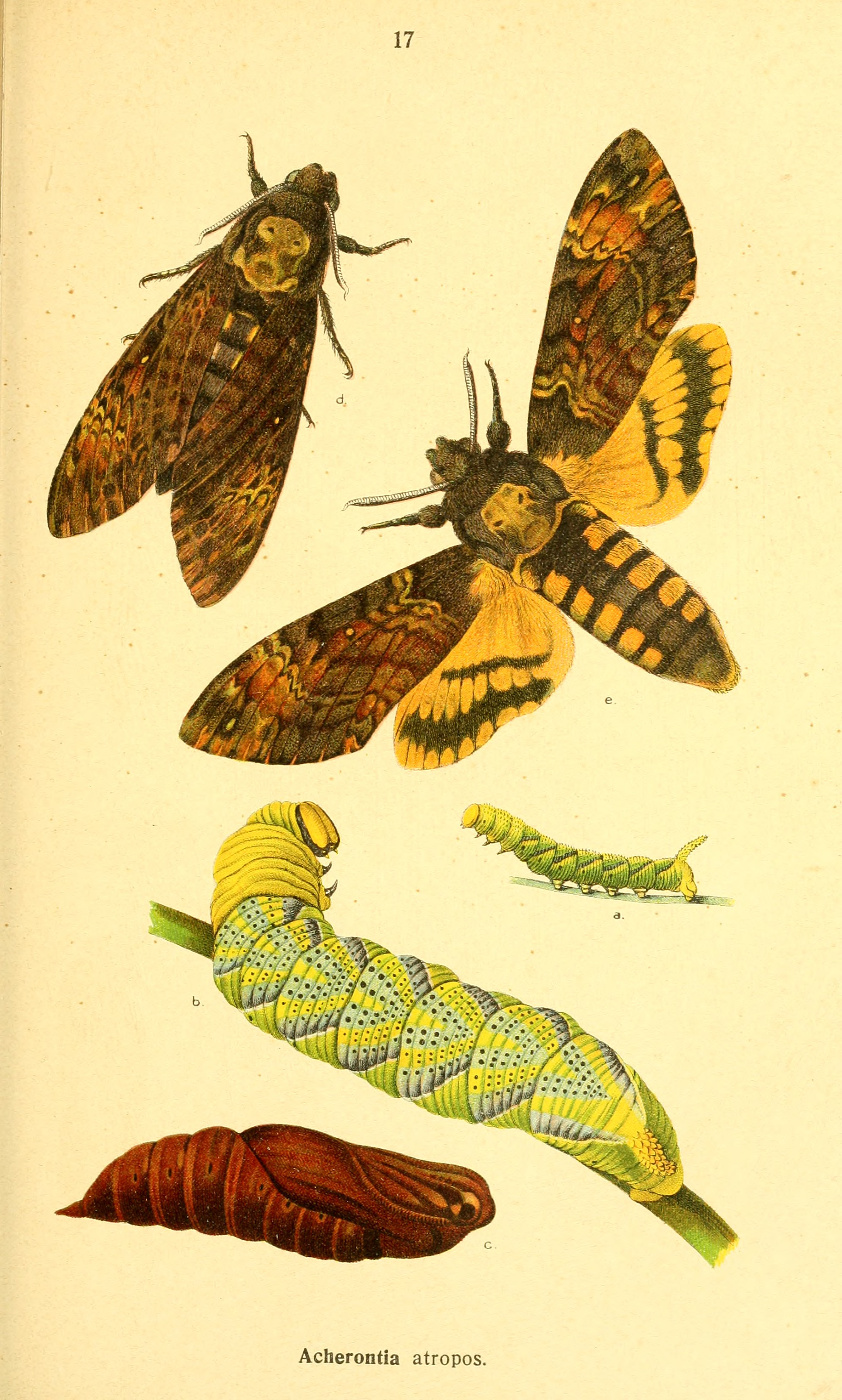 Plate from Die Schmetterlinge Deutschlands mit besonderer Berücksichtigung ihrer Biologie, Bd. 1-4, by K. Eckstein